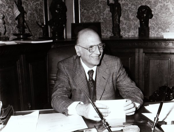 lucia valenzi, archivio valenzi, primo piano di maurizio valenzi, free, Valenzi sindaco